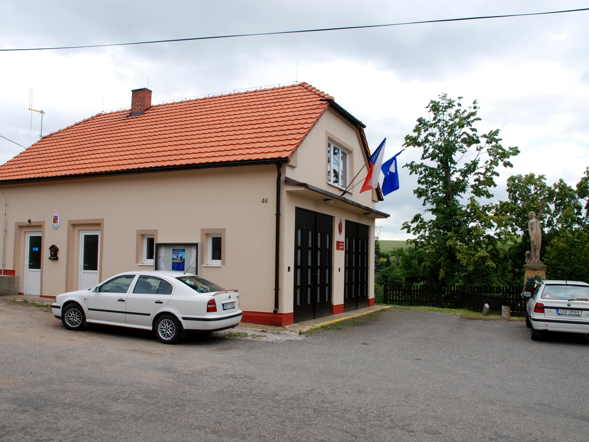 Česky: Krakovec - budova obecního úřadu, hasičské zbrojnice a socha svobody